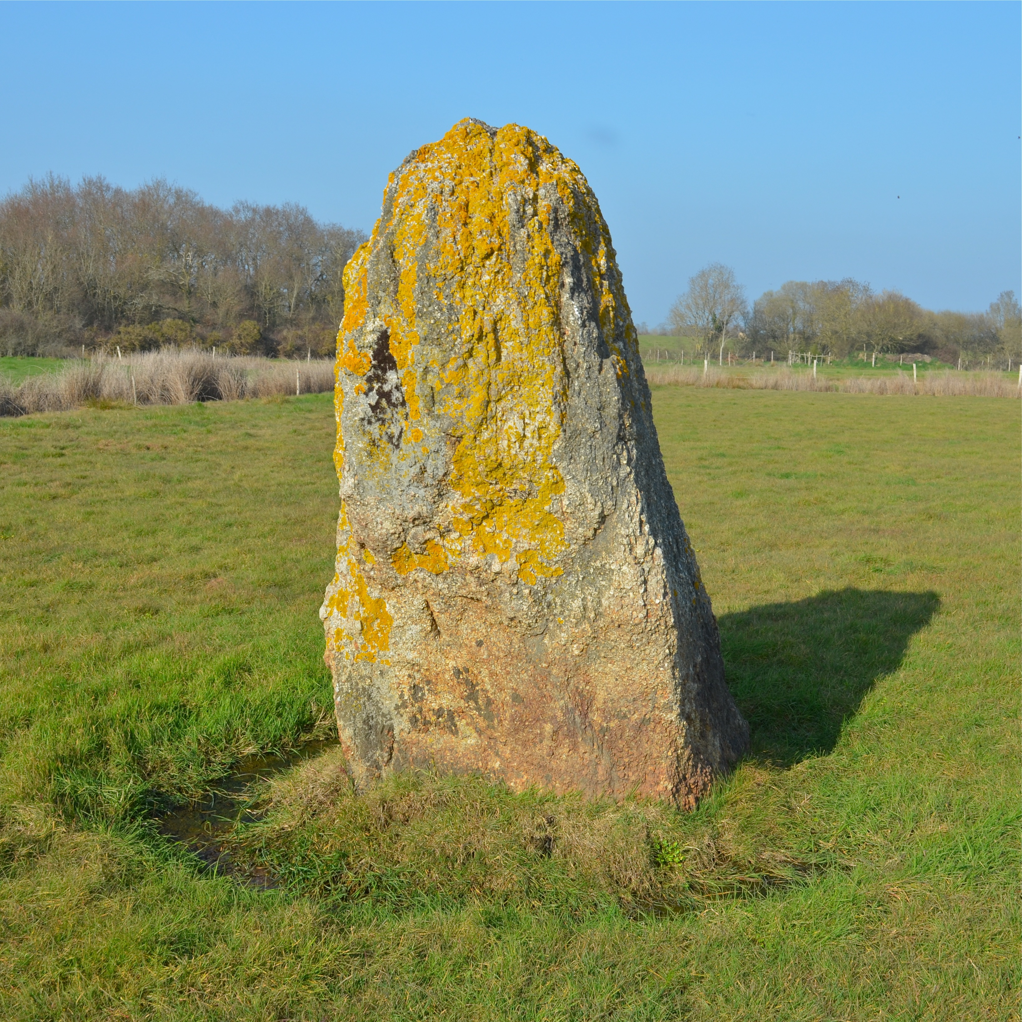 Menhir de Pierre-Bonde - Corsept, Loire-Atlantique (France)